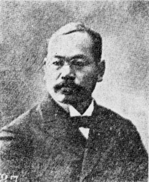 久米 民之助